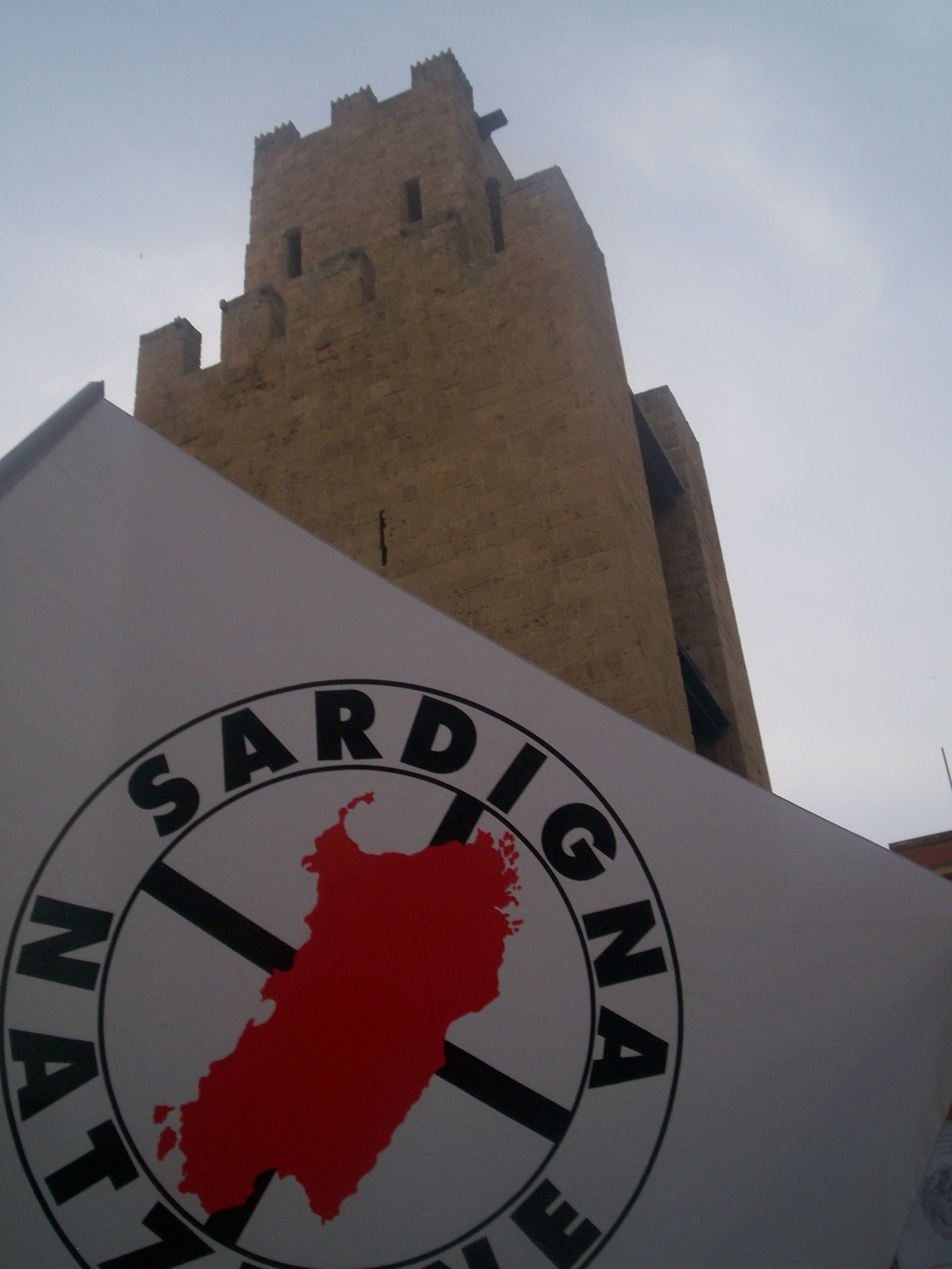 Autore: Davide Nurra, fonte archivio personale, Autorizzo l'uso di questa immagine per la pagina relativa al movimento SNI. La bandiera del movimento indipendentista SNI è abinata alla torre di Mariano II.